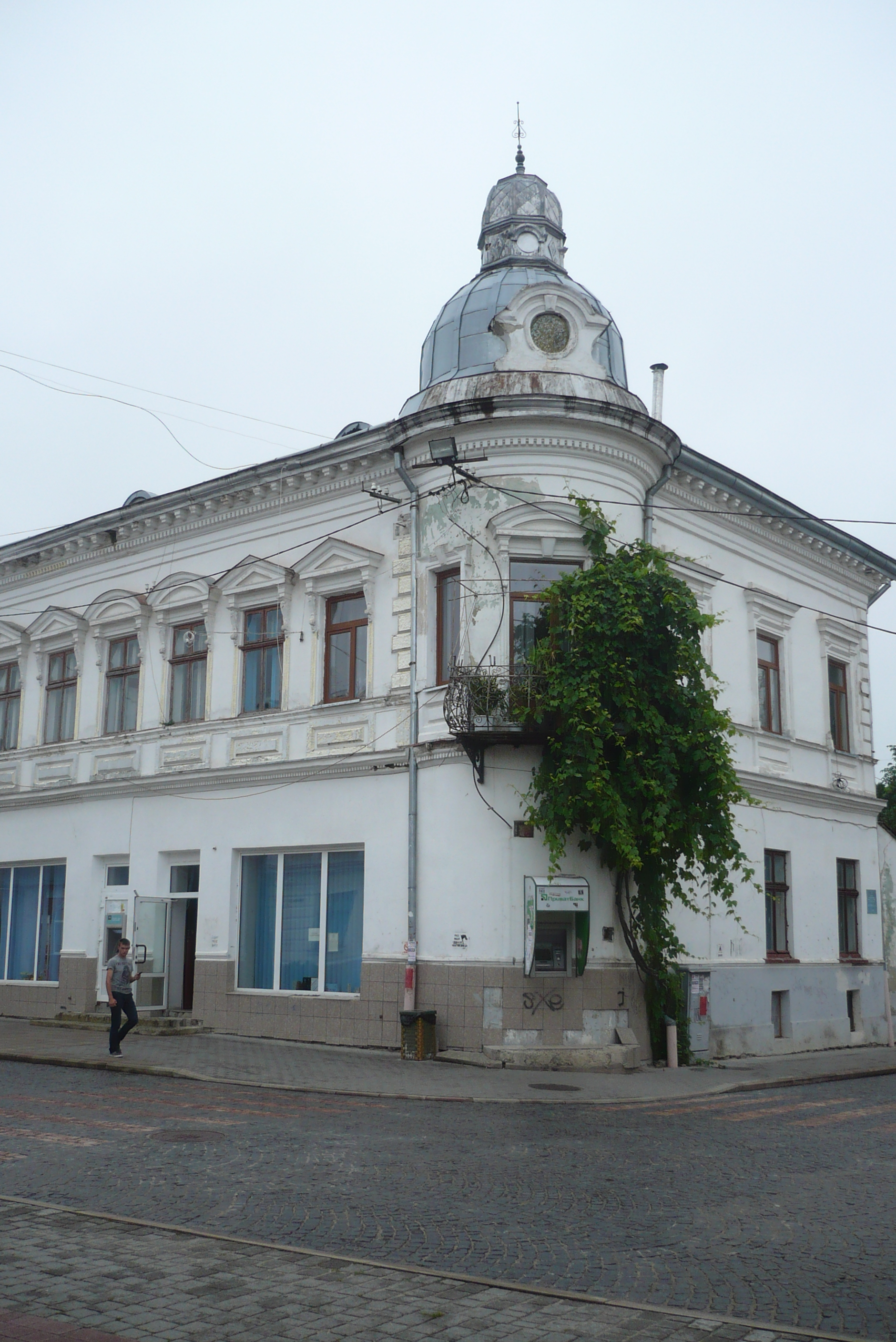 Kamienica w Złoczowie